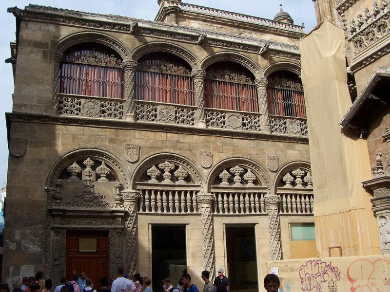 Granada - Capilla Real